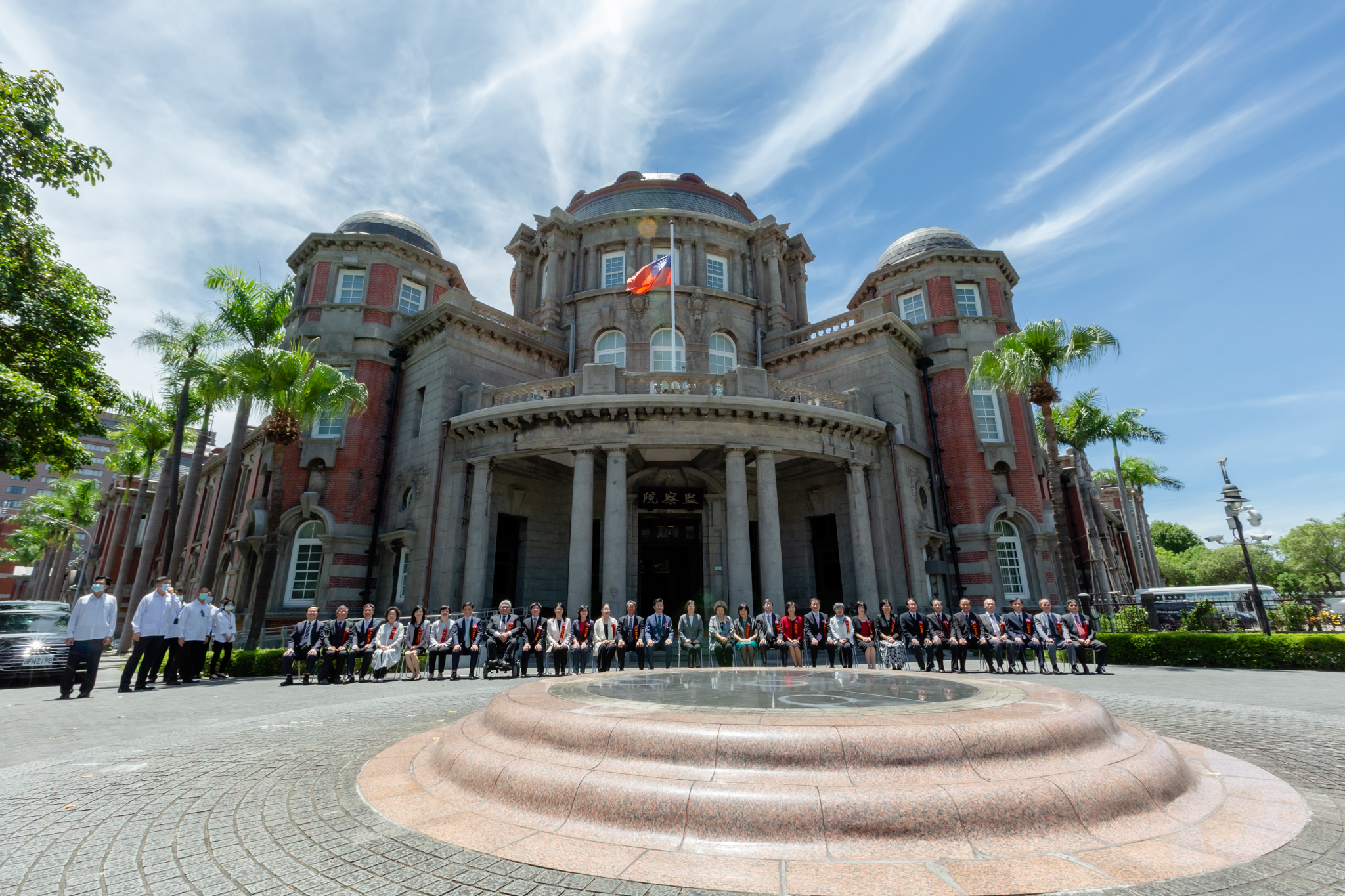 第六屆監察委員及總統蔡英文於監察院正門合影